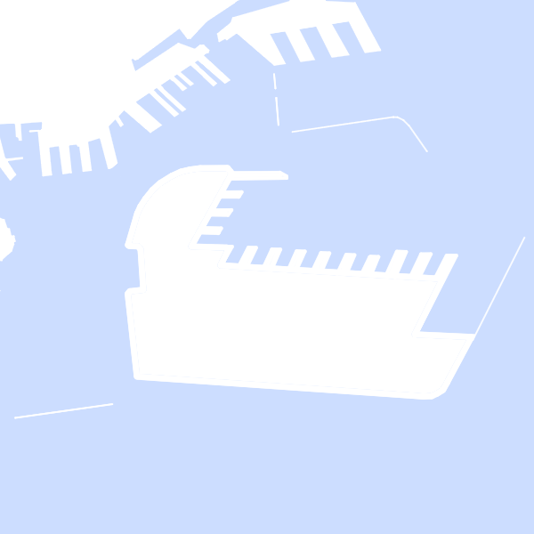 昭和39年ポートアイランド構想図